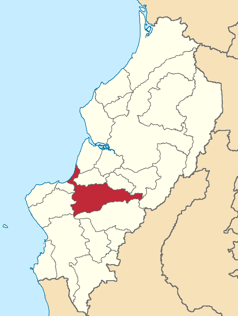 Mapa localizador del cantón en Manabí, Ecuador